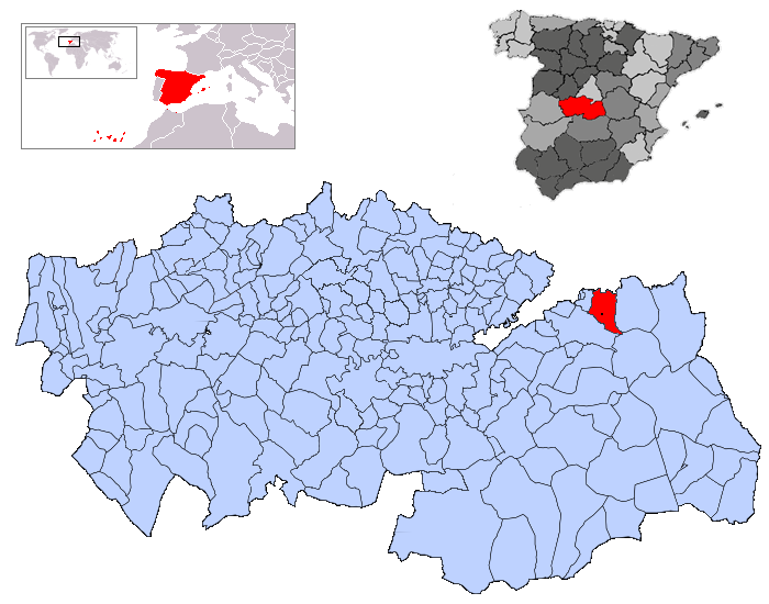 Noblejas en la provincia de Toledo